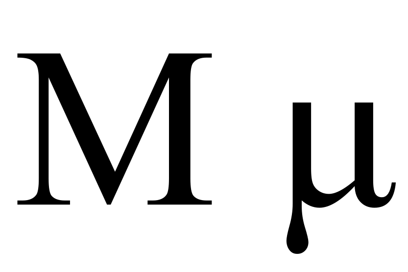 greek letter mu